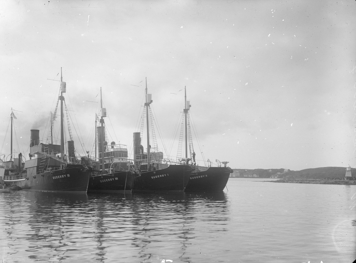 Hvalbåtene Suderøy I, Suderøy II, Suderøy III og Suderøy IV av Haugesund. Båtene fanget for det flytende hvalkokeriet Suderøy.